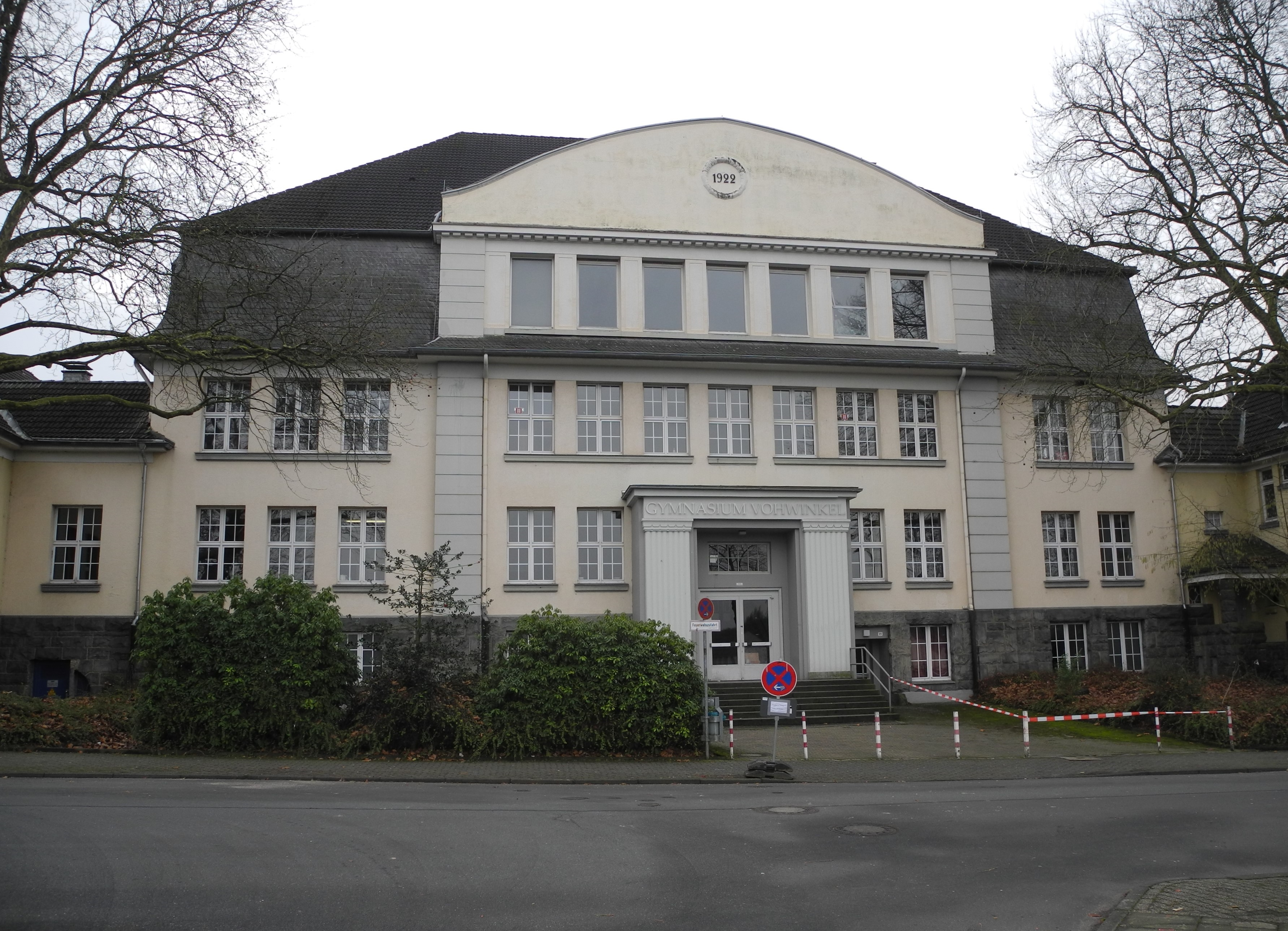 Wuppertal, Wohnquartier Westring, Goerdelerstr. 21 (Gymnasium Vohwinkel)